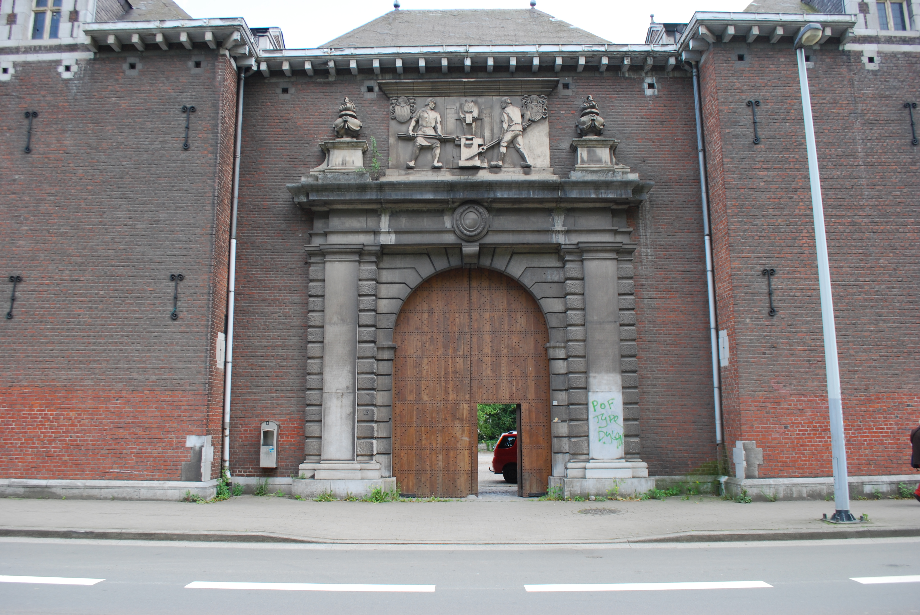 Vue du chantier de rénovation et de réaffectation des anciens bâtiments de l'Université de Liège, au Val Benoît à Liège.